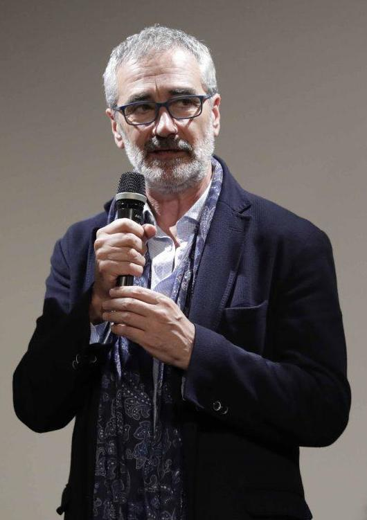 La Empresa Municipal de Transportes (EMT) y el director de cine Javier Fesser, así como las diez personas protagonistas con discapacidad intelectual de la película ‘Campeones’, han sido los merecedores del premio ‘Madrid Incluye’ 2018. Los galardones han sido entregados por la delegada de Políticas de Género y Diversidad, Celia Mayer, con motivo del Día Internacional de las personas con discapacidad., en un acto al que también ha asistido la portavoz del Gobierno municipal, Rita Maestre.